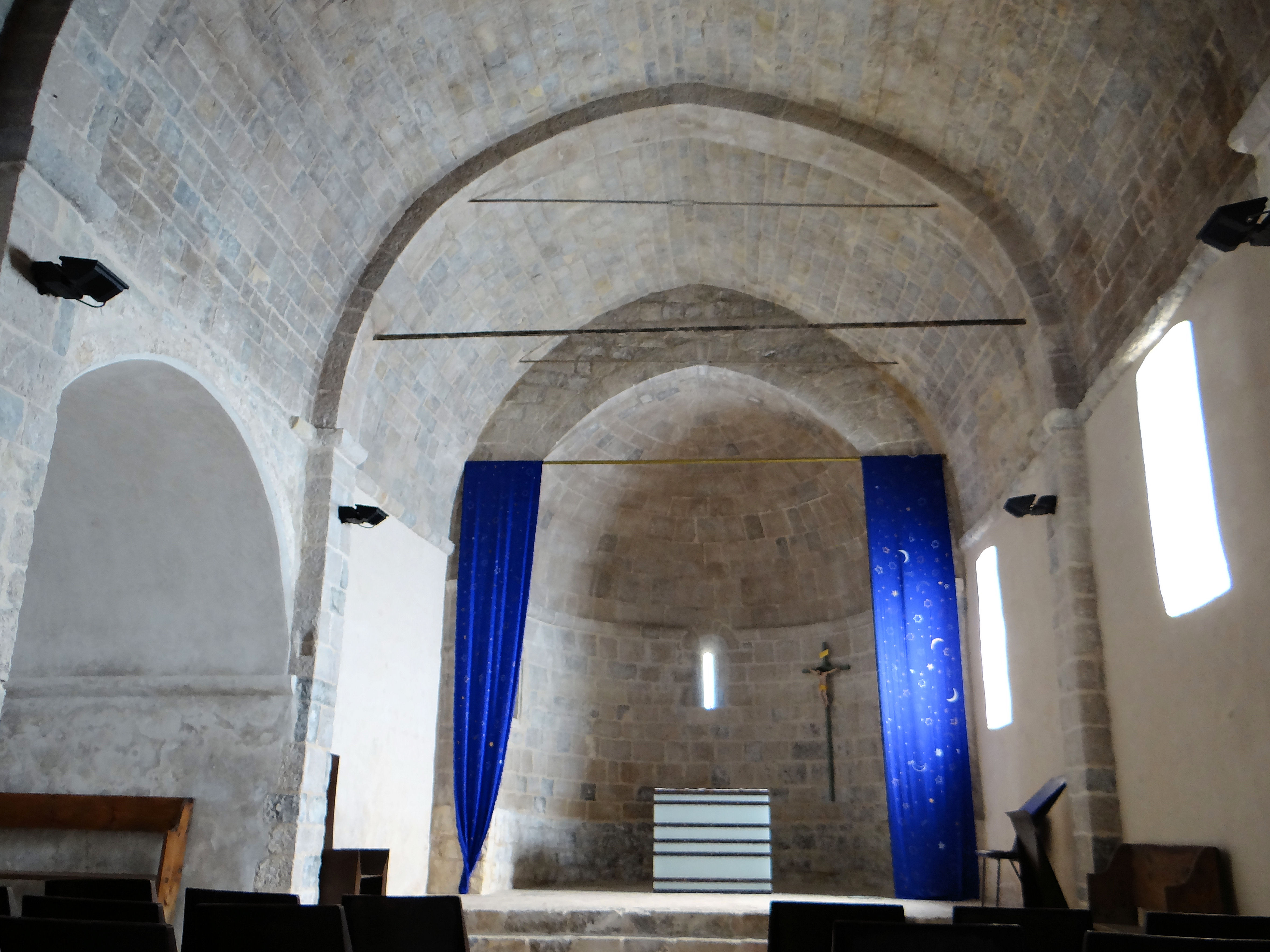 Le Mas - Église Notre-Dame - Nef, vers l'abside .